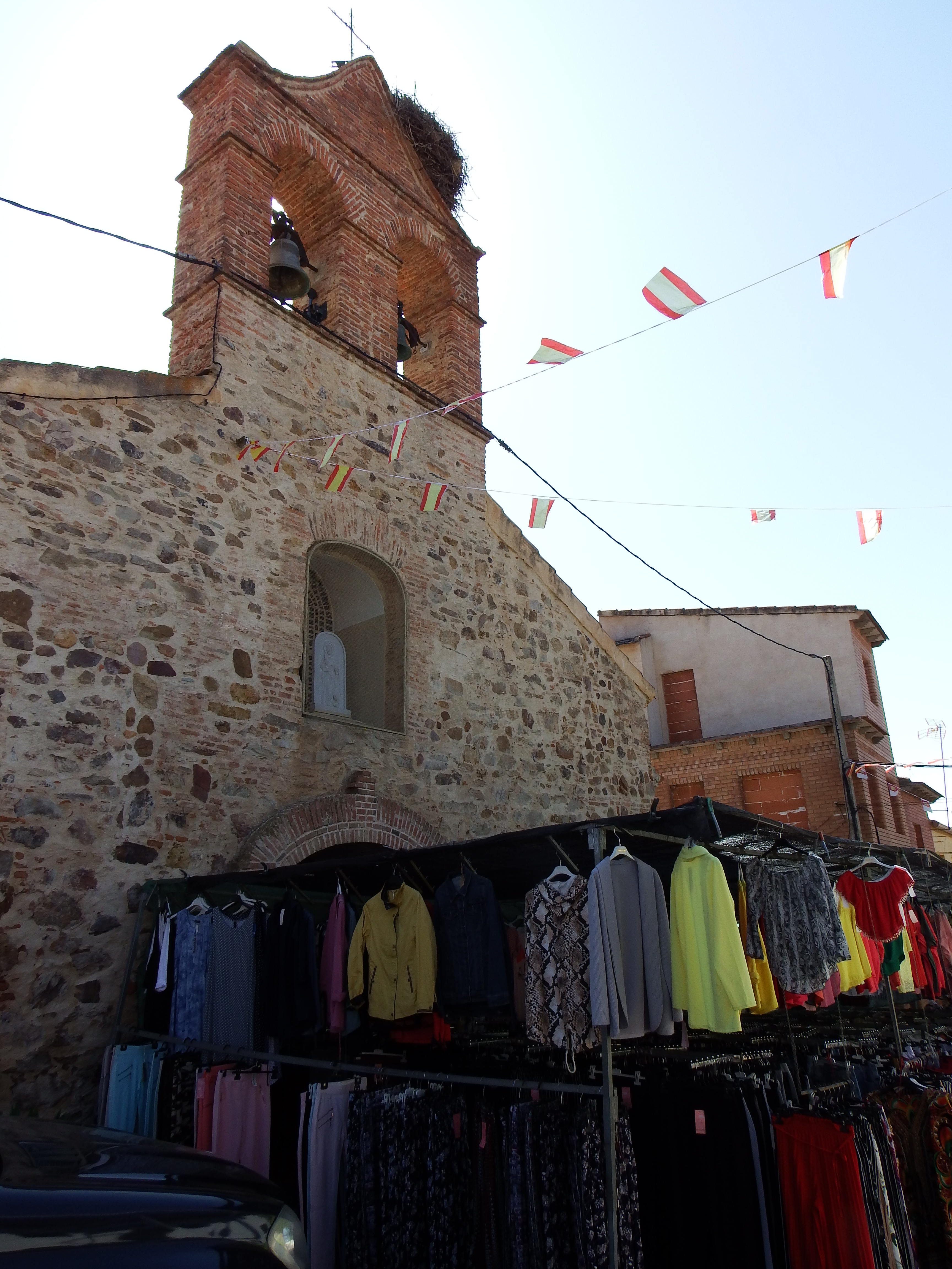 Navalpino